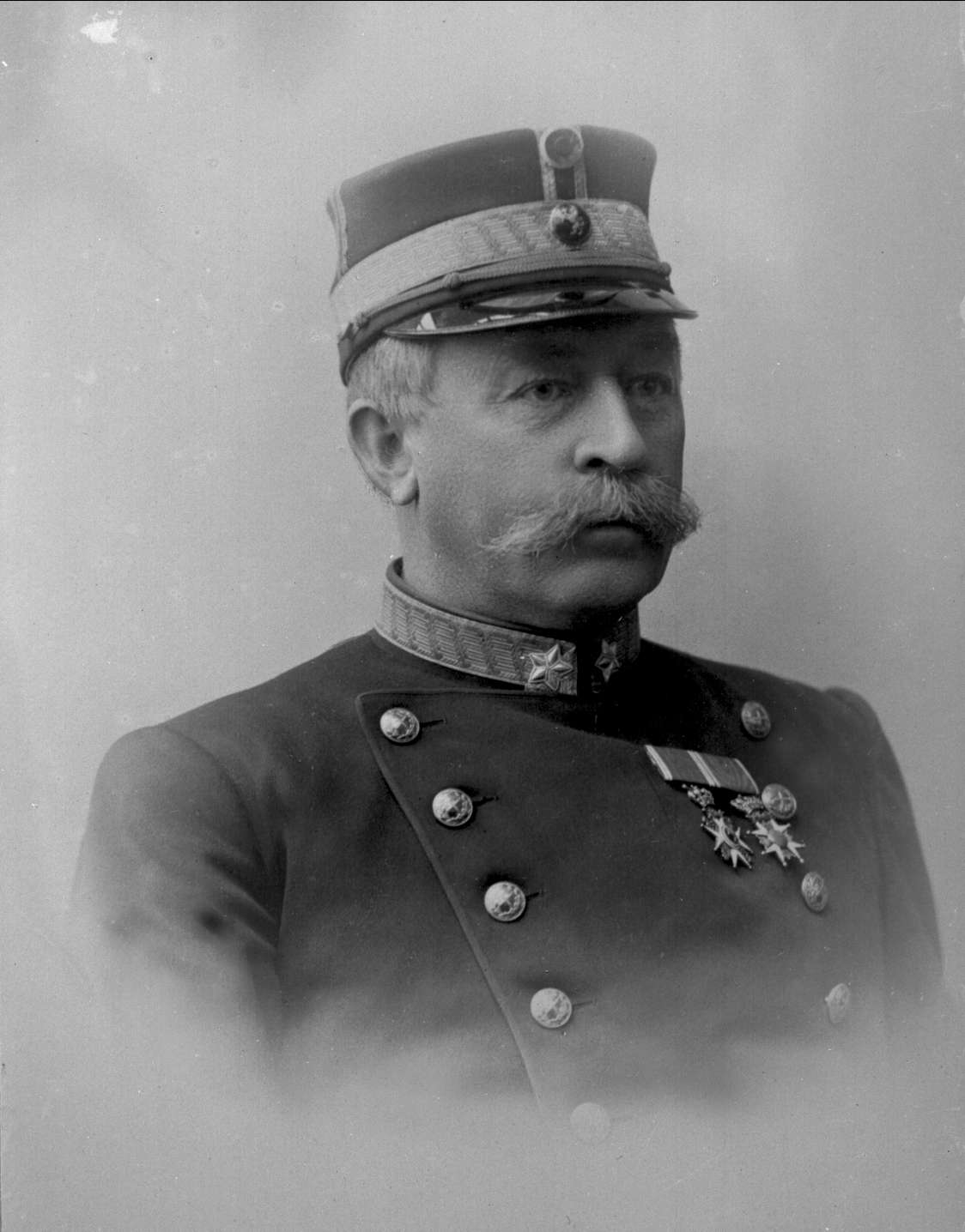 Henrik Steffens Hagerup i uniform som general.